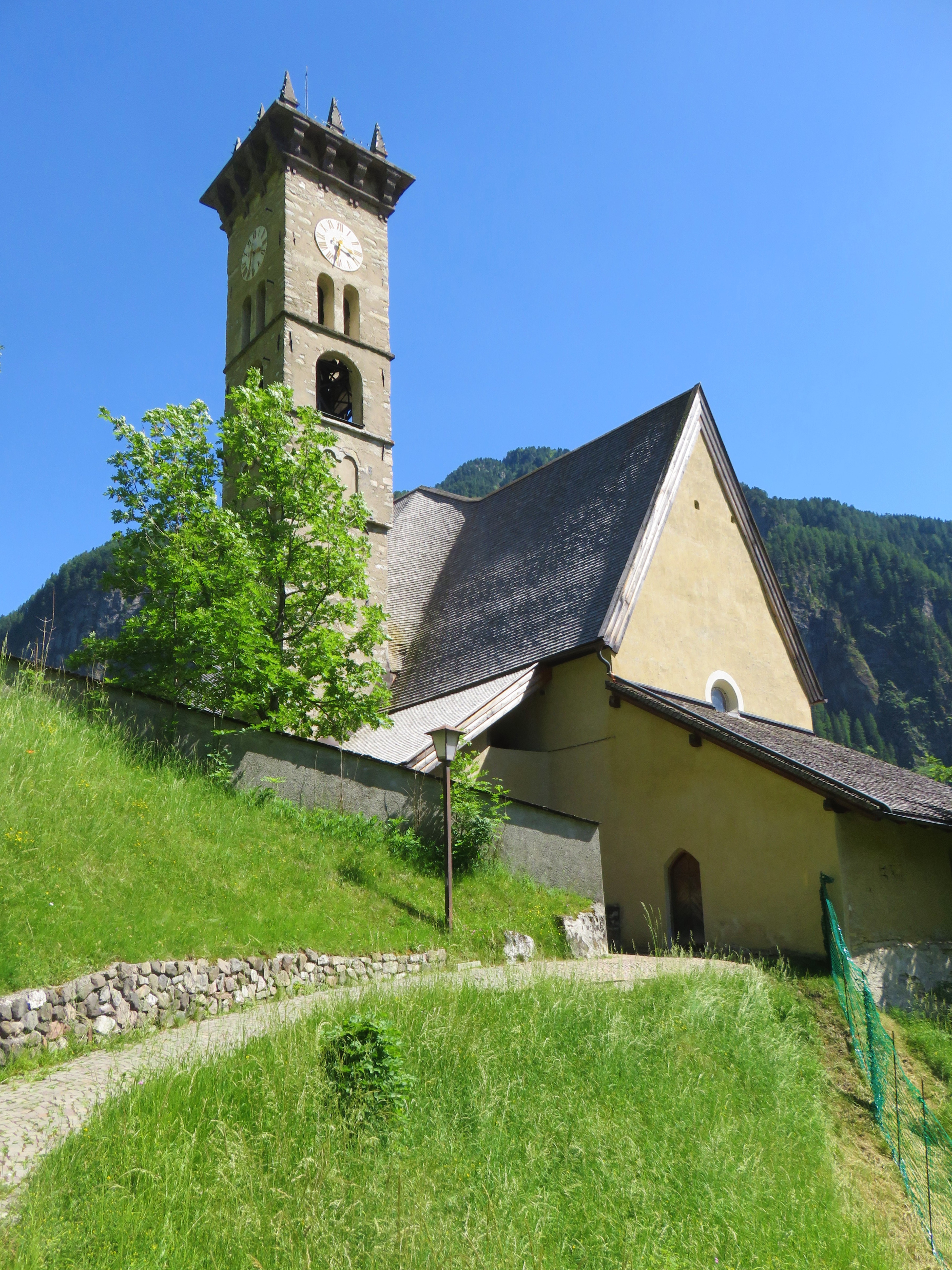 Chiesa dei Santi Filippo e Giacomo a Campitello di Fassa. Esterno con campanile visto dalla Via Crucis